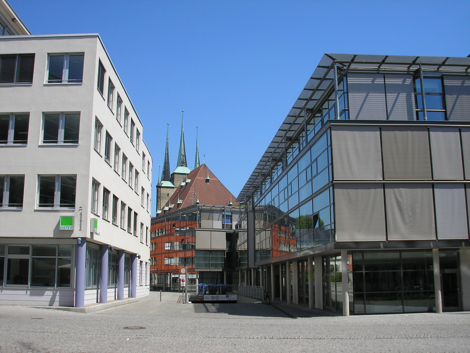 Neubauten im ehemaligen Industriegebiet im Brühl hinter dem Dom in Erfurt.